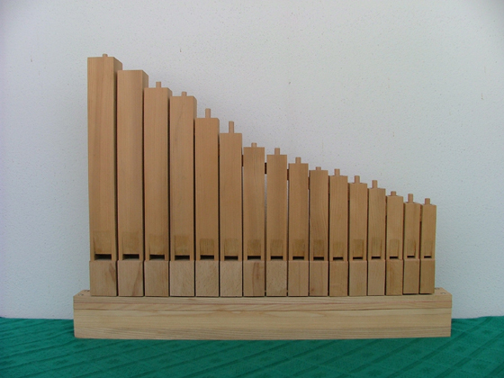 Beschreibung: Flötenwerk mit 16 Tonstufen (Gedeckte Pfeifen, Holz), selbst hergestellt.